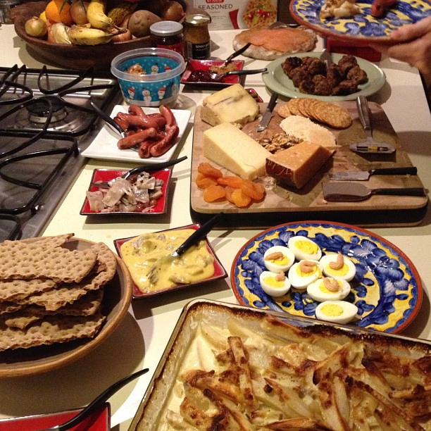 julbord! janssons frestelse, köttbullar, sill, prinskorv och ost!